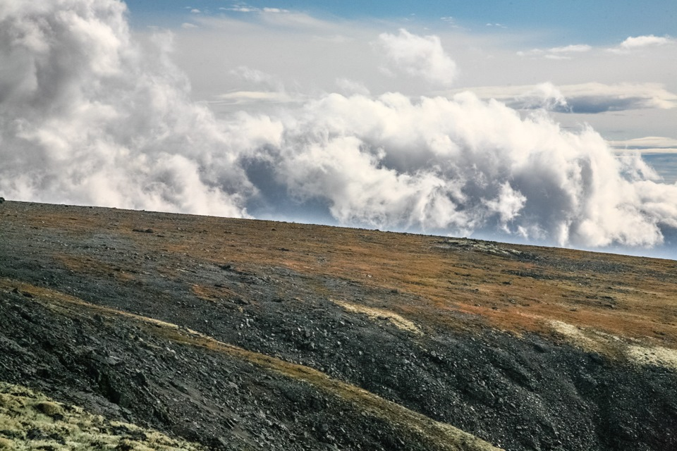 Хибины, This image is related to the protected area of Russia number 5100013